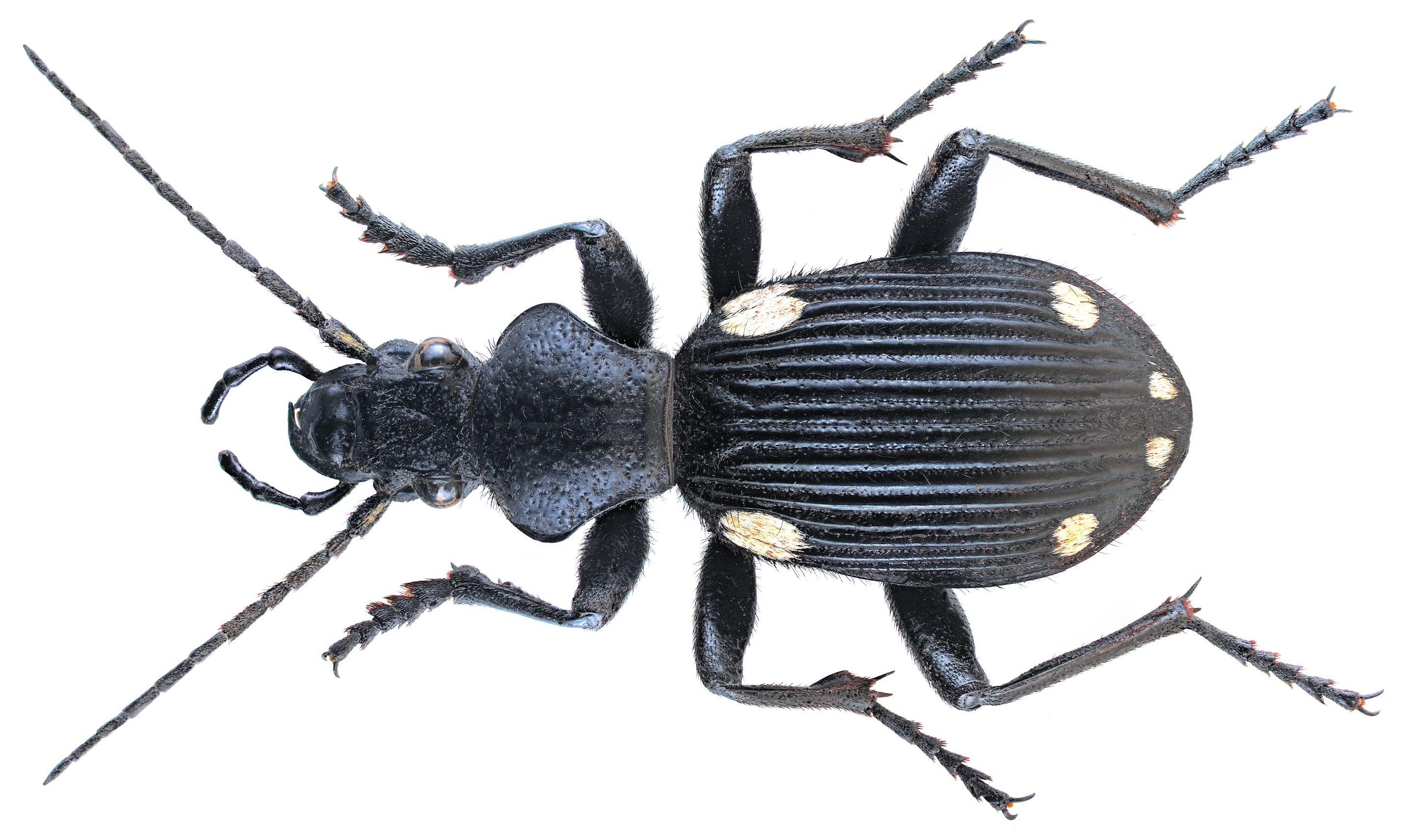 Familie: Carabidae Grösse: 40 mm Fundort: Kenia, Tsavo National Park leg. U.Schmidt, 1991; det. W.Lorenz Foto: U.Schmidt, 2006